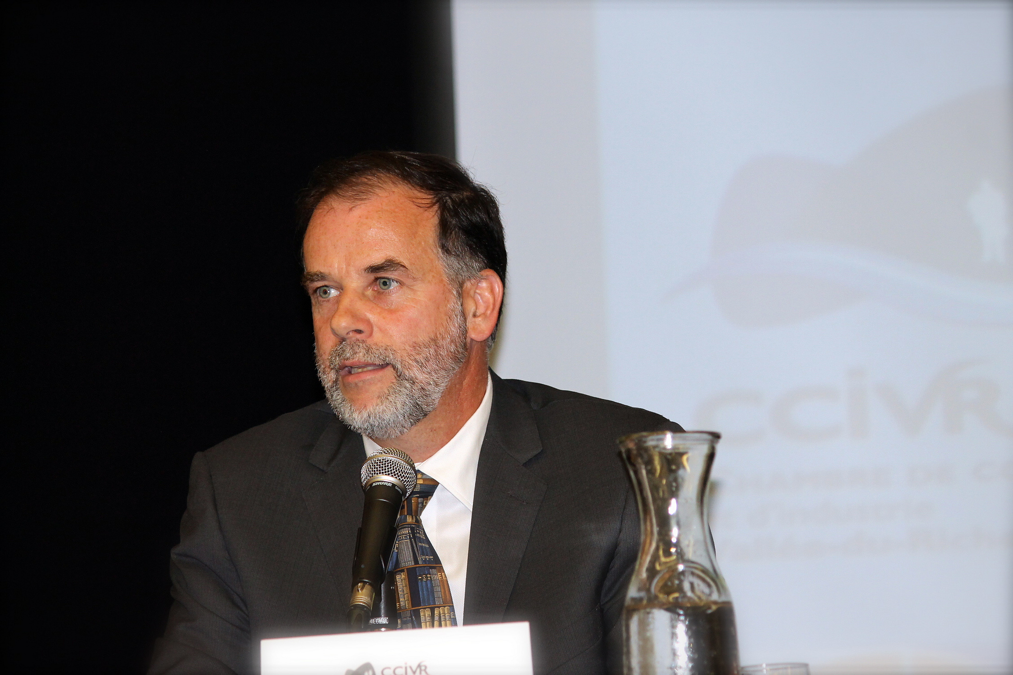 Pierre Duschesne em palestra.